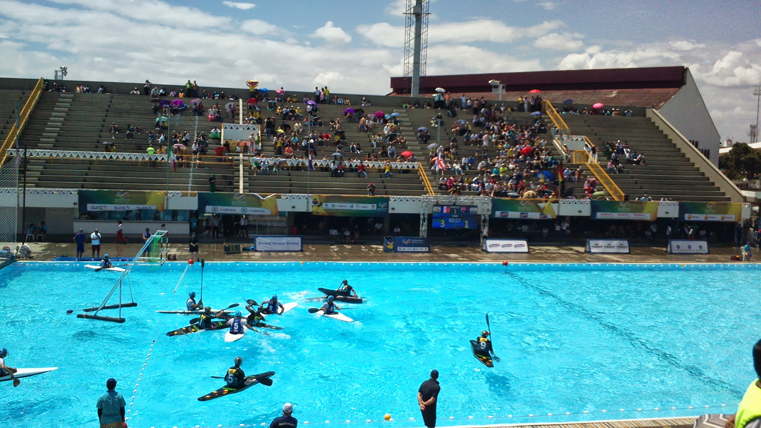 Competencias Polo Kayak